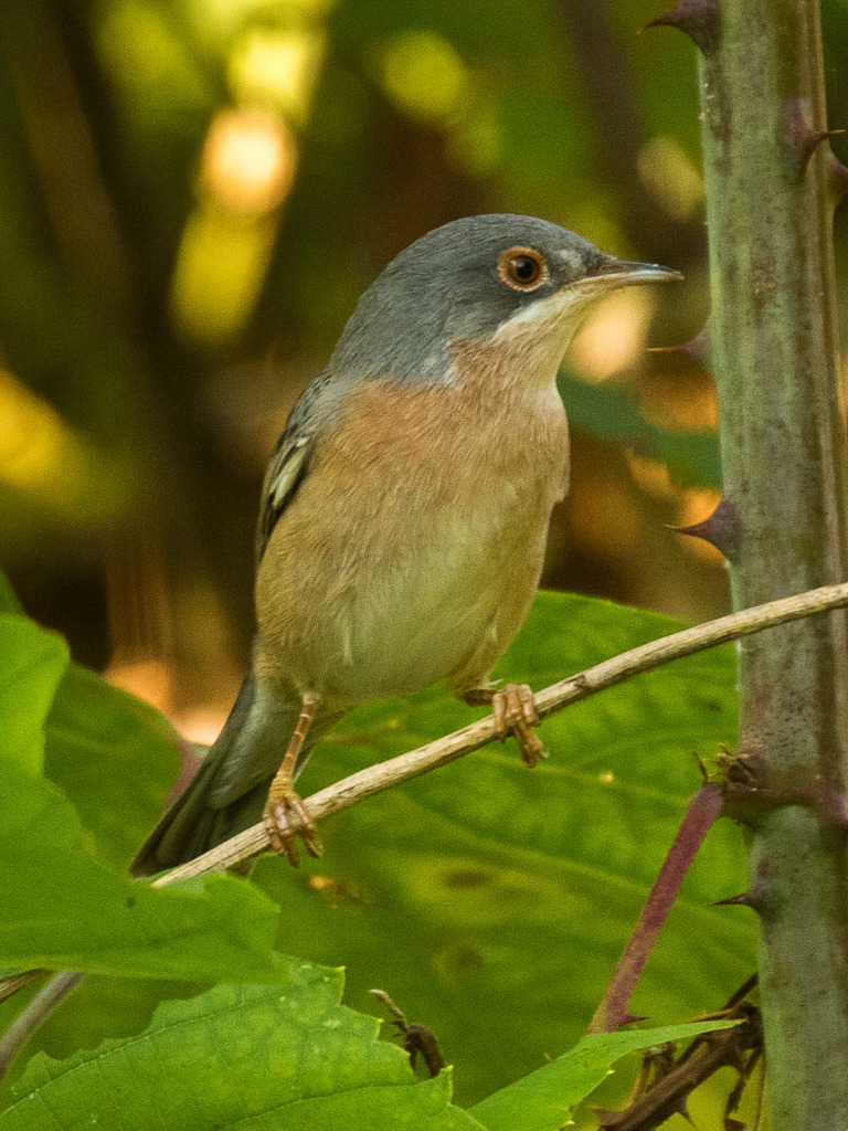 Moltoni's Warbler - Castelletto Merli - Italy_FJ0A2650